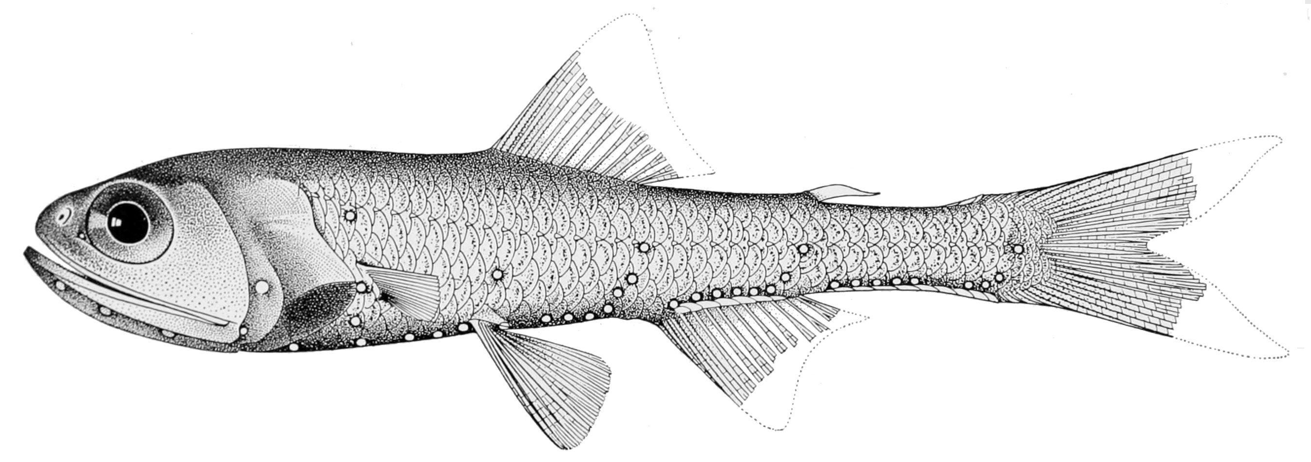 Ceratoscopelus warmingii